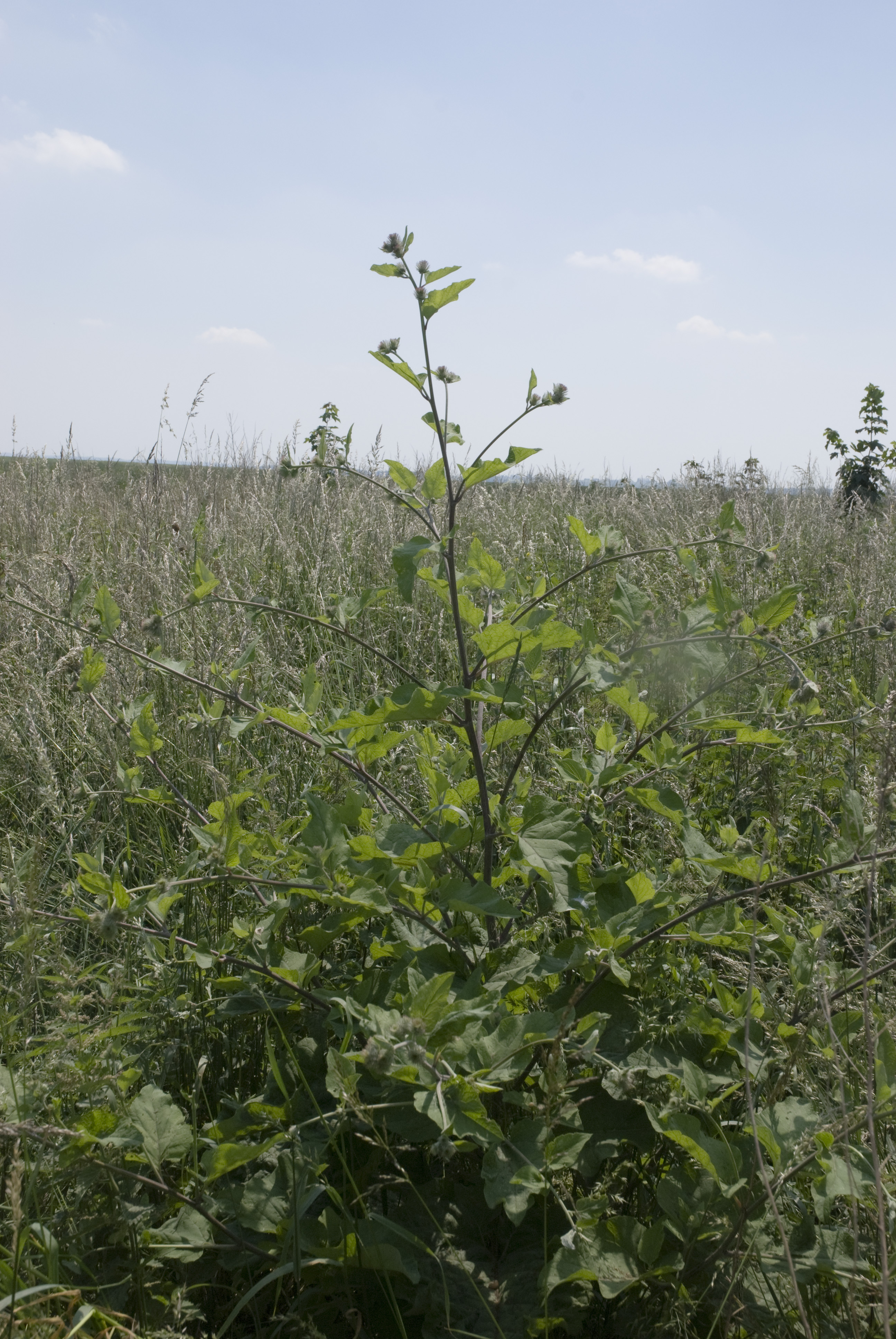 Arctium nemorosum Velennes (Somme), France